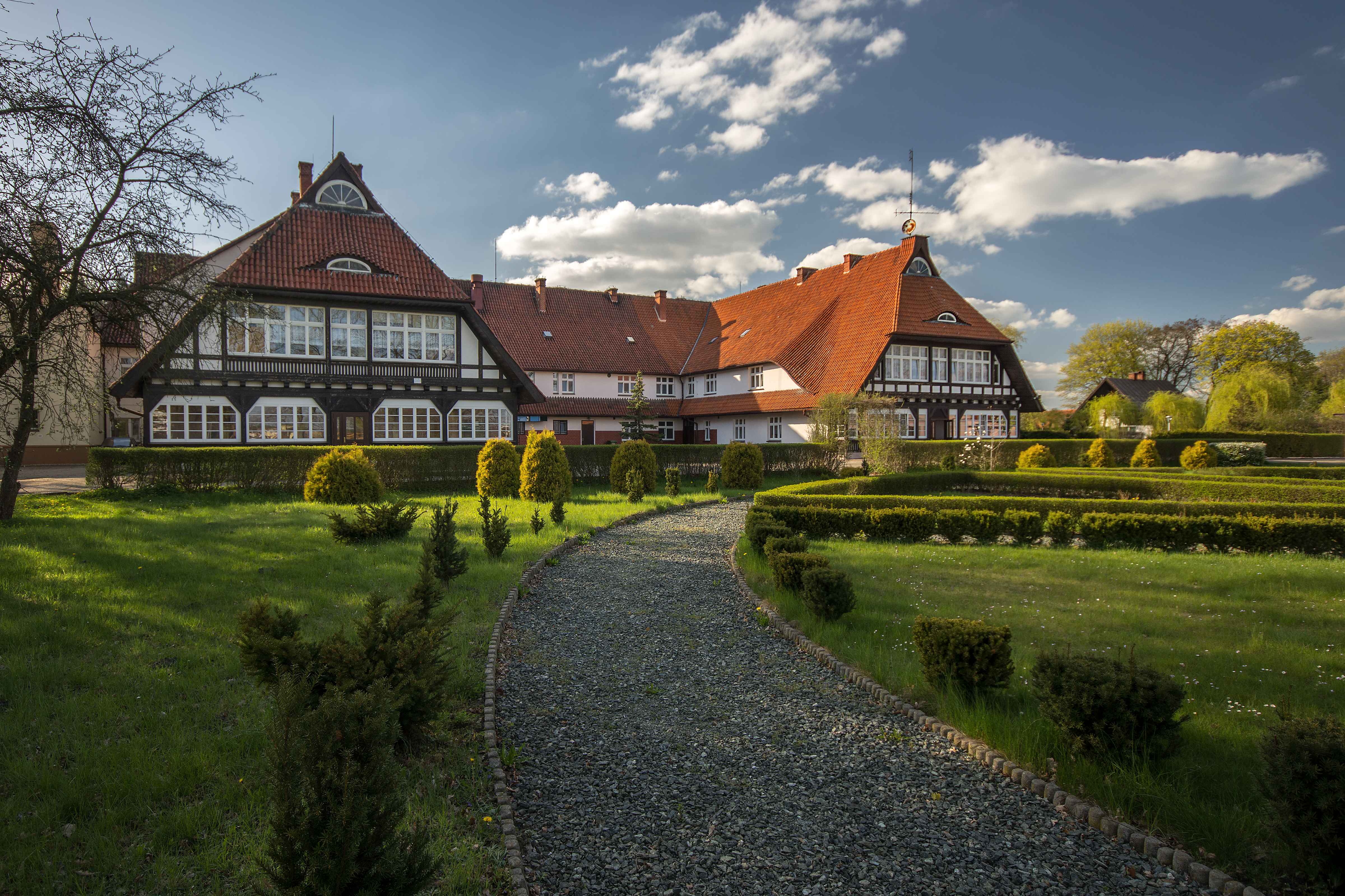 Marszałki, budynek sierocińca, pocz. XX